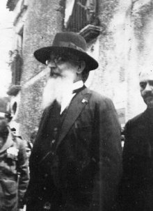 Ottavio Dinale a Trentinara durante l'inaugurazione monumento ai caduti